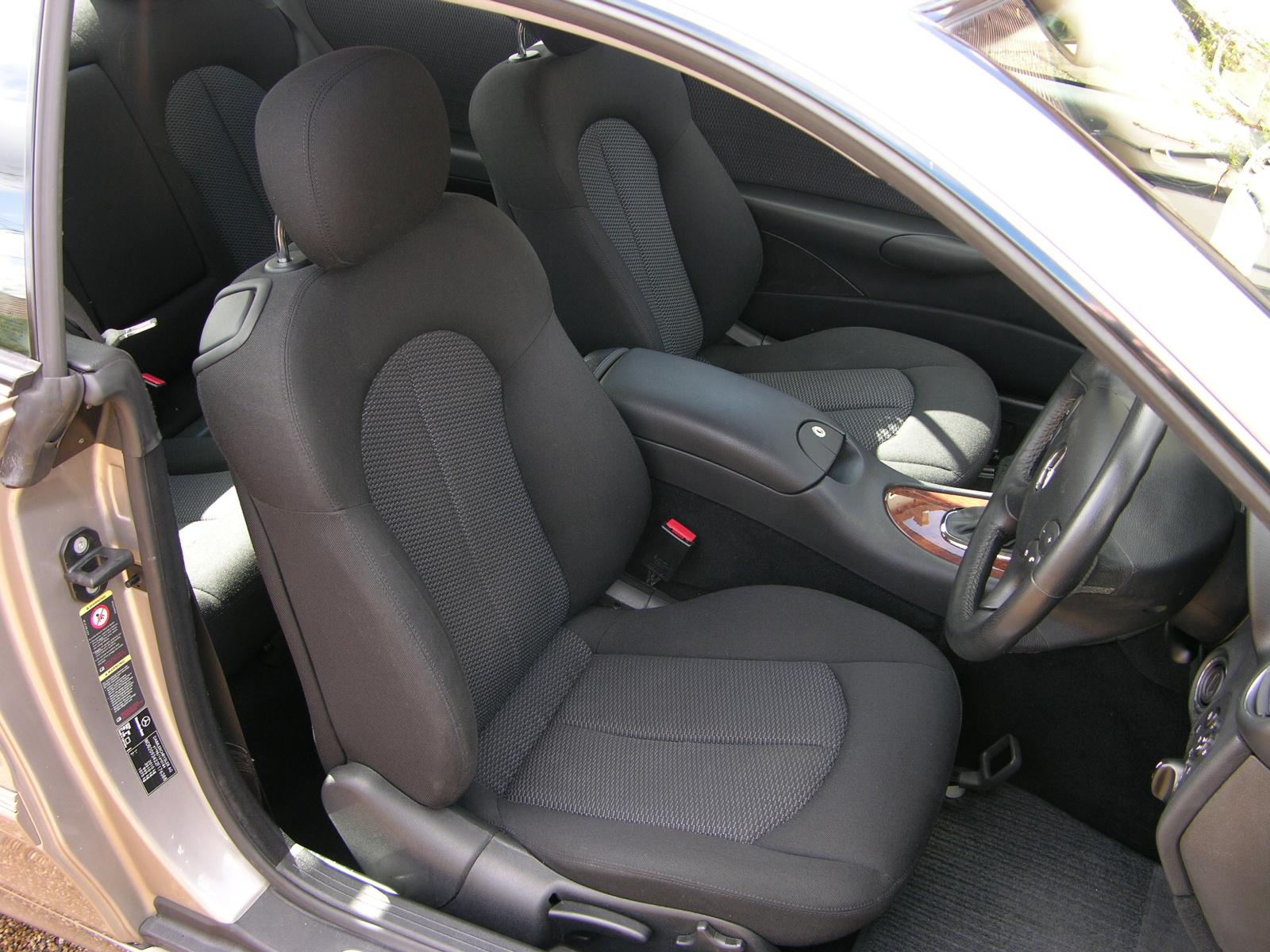 Mercedes Benz CLK 200 Kompressor